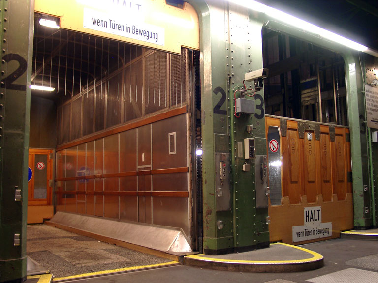 Türen der Fahrzeug-Fahrstühle im Alten Elbtunnel, in St. Pauli. This is the photograph of an architectural monument. It is part of the list of cultural monuments of Hamburg, no. 1399